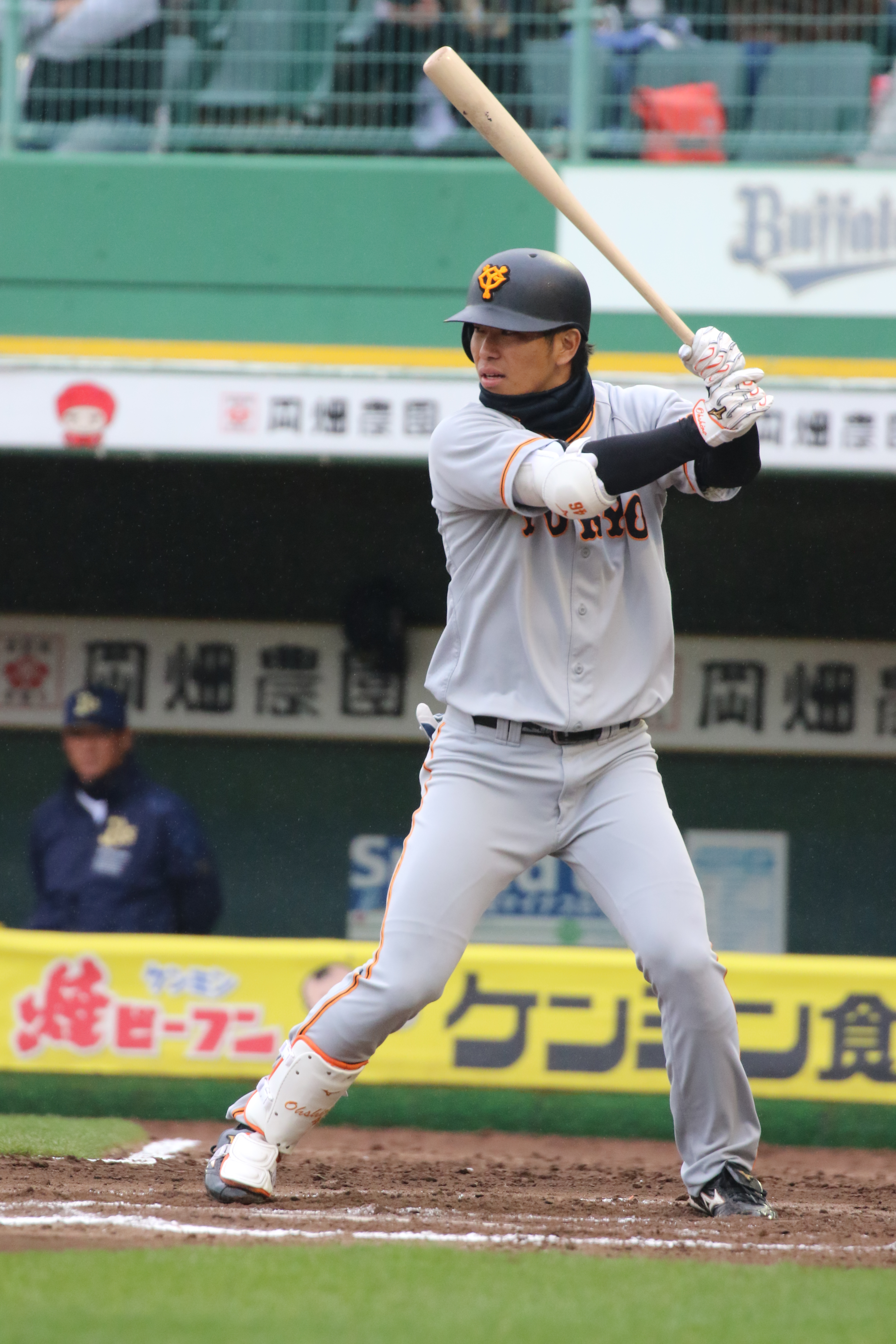 ジャイアンツ大城選手